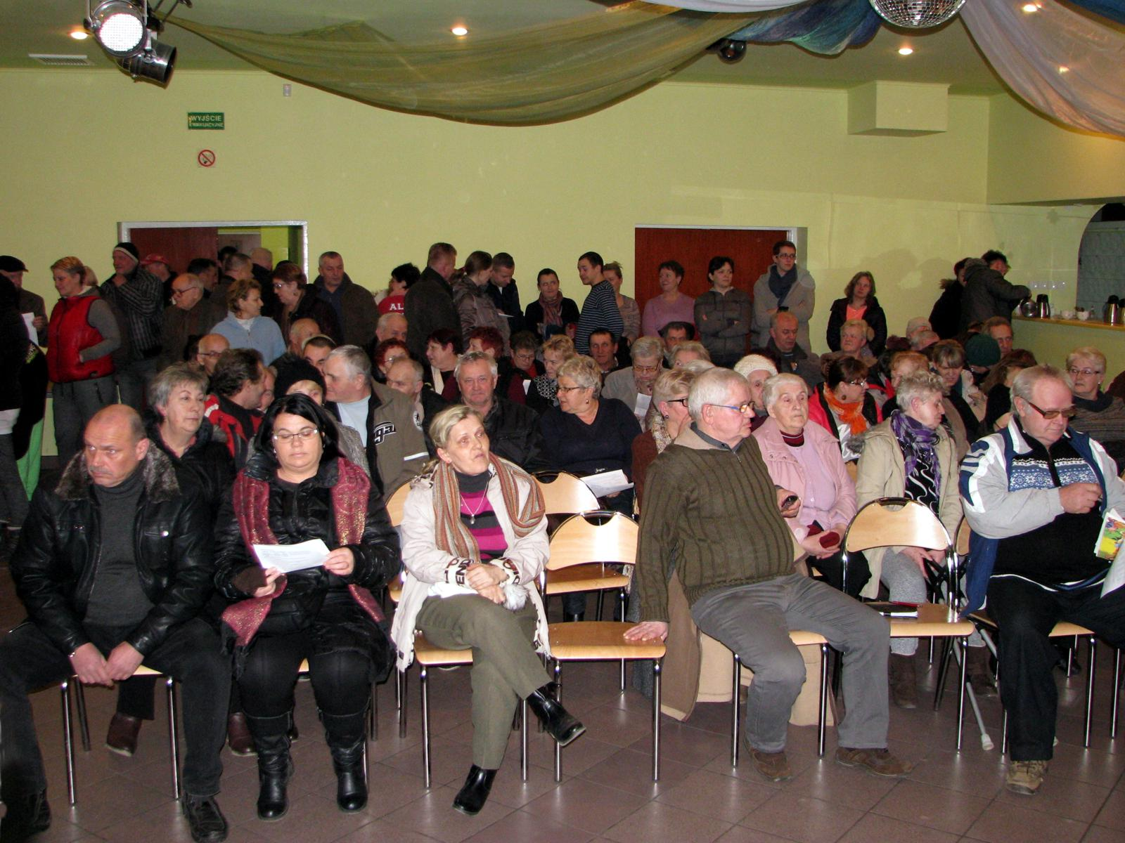 Wojcieszyce. Zebranie wiejskie